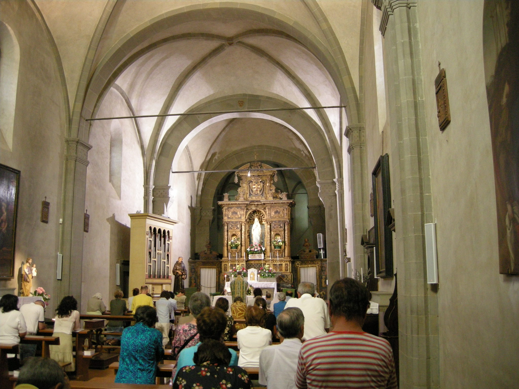 Convento del bosco ai frati, interno